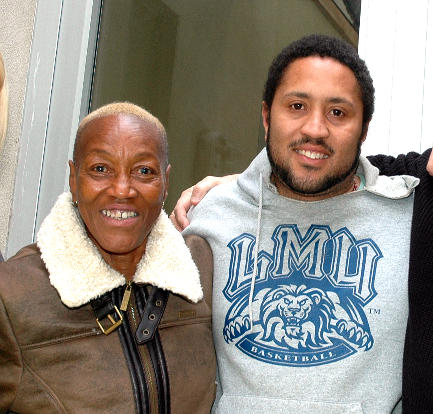 Gloria Jones mit ihrem Sohn Rolan Bolan, vor seinem Haus in Hollywood, Los Angeles 2014